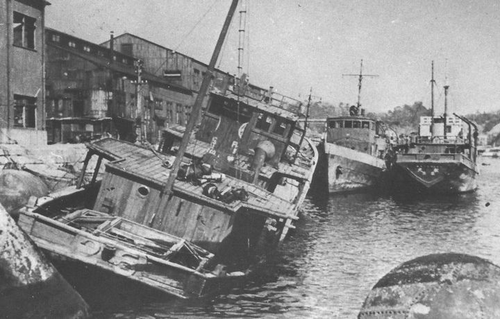 日本海軍第一号型哨戒特務艇『第二十六号哨戒特務艇』、浦賀造船所岸壁